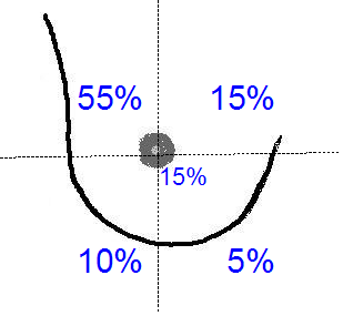 Brustquadranten -Mammakarzinom